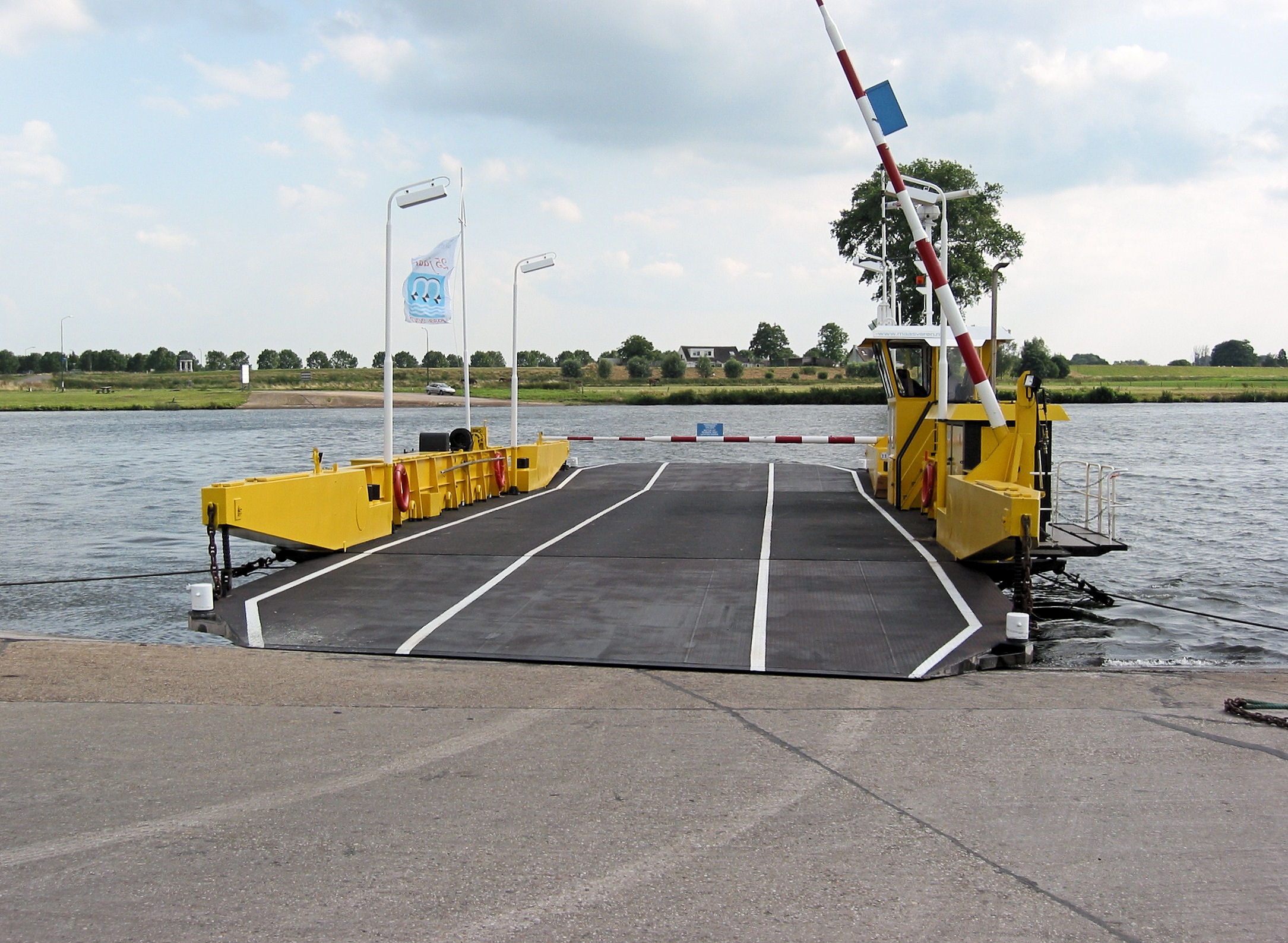 Oijen veerpont vooraanzicht